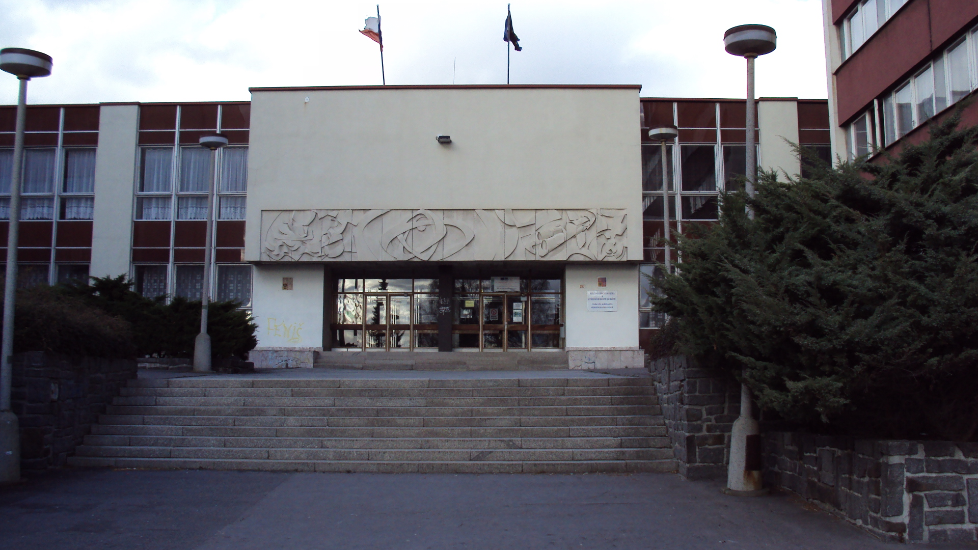 Hlavní budova učňovského školství, ul.28. října 2707